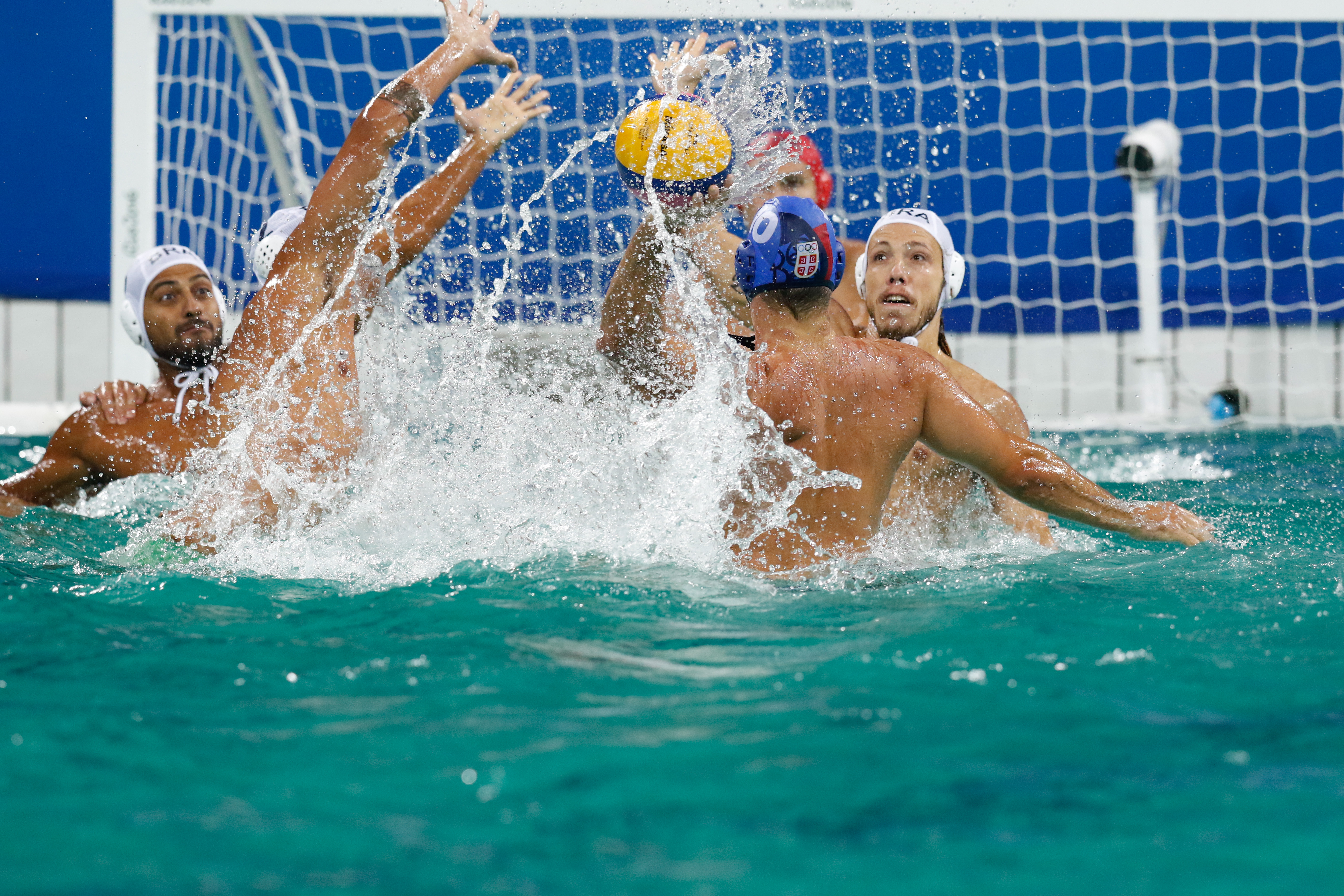 Rio de Janeiro - Seleção masculina brasileira de polo aquático vence a da Sérvia por 6 a 5 nos Jogos Olímpicos Rio 2016, no Parque Aquático Maria Lenk (Fernando Frazão/Agência Brasil)